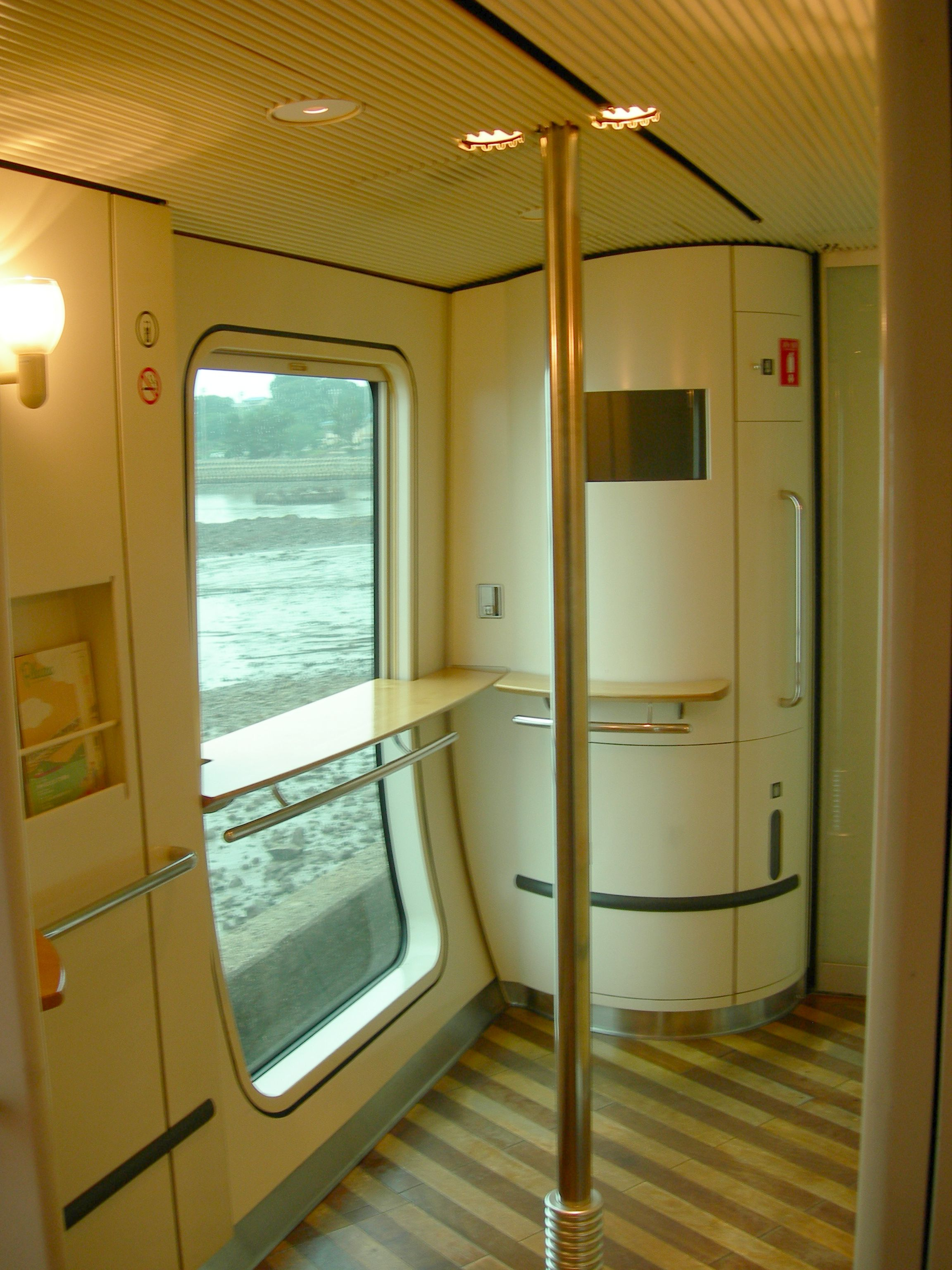 JR九州885系電車 コモンスペース